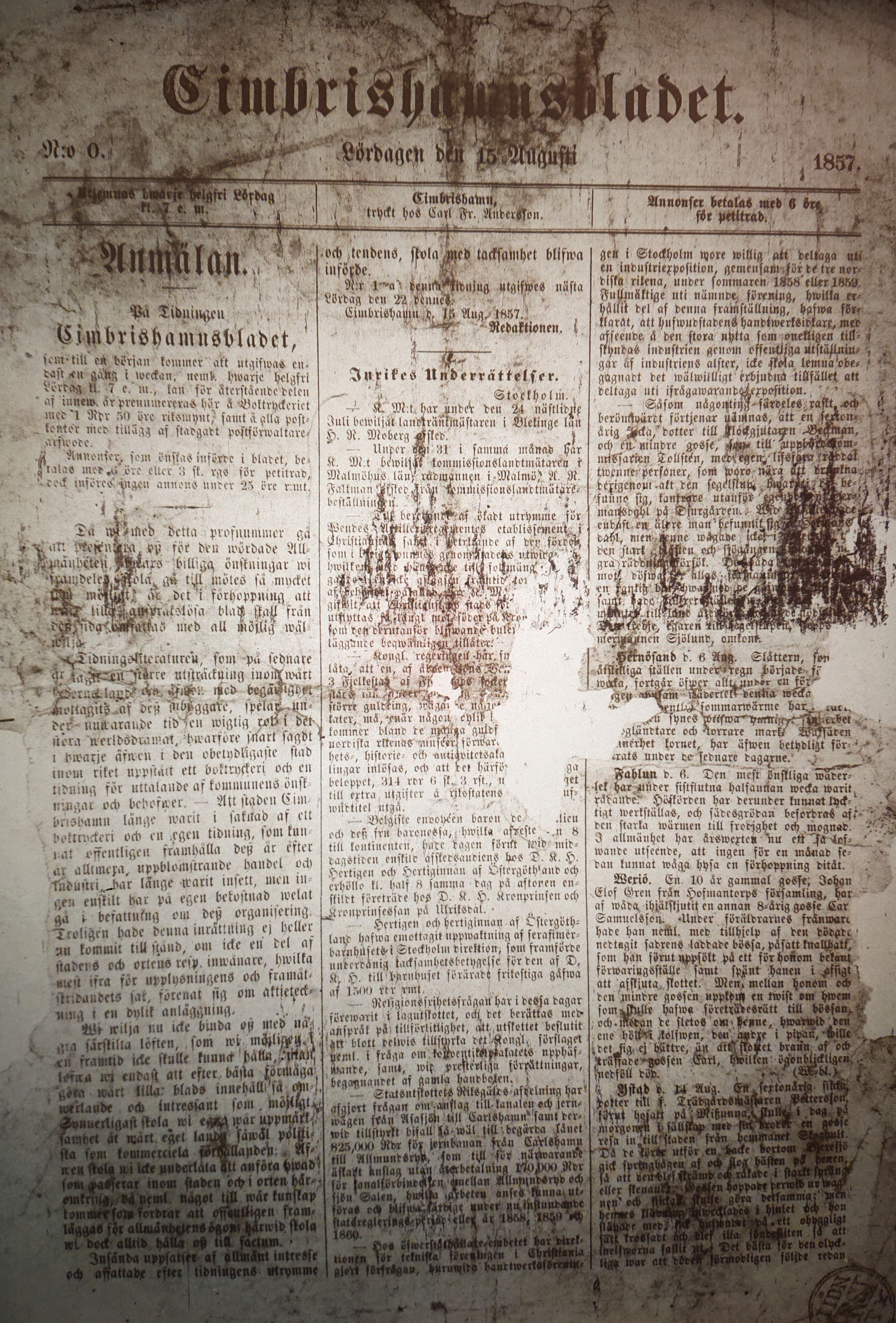 Cimbrishamnsbladet 15 Augusti 1857, Första sidan av första numret